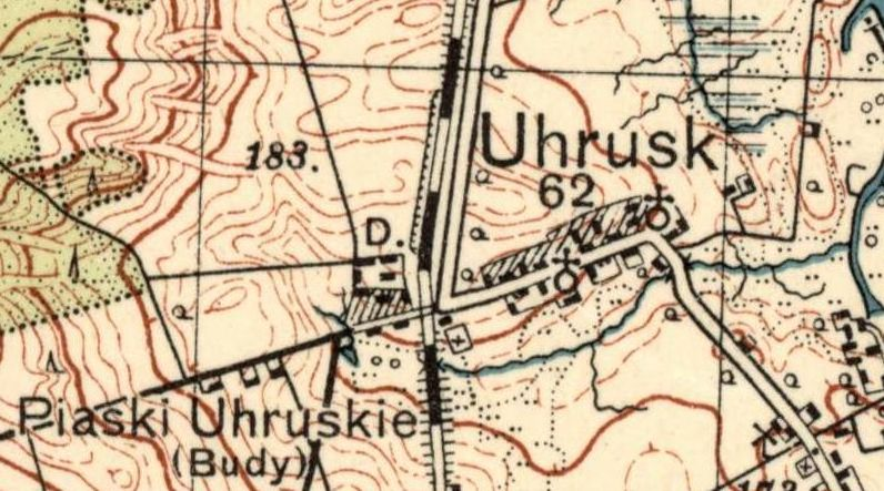 Uhrusk na mapie Wojskowego Instytutu Geograficznego z 1933 r.